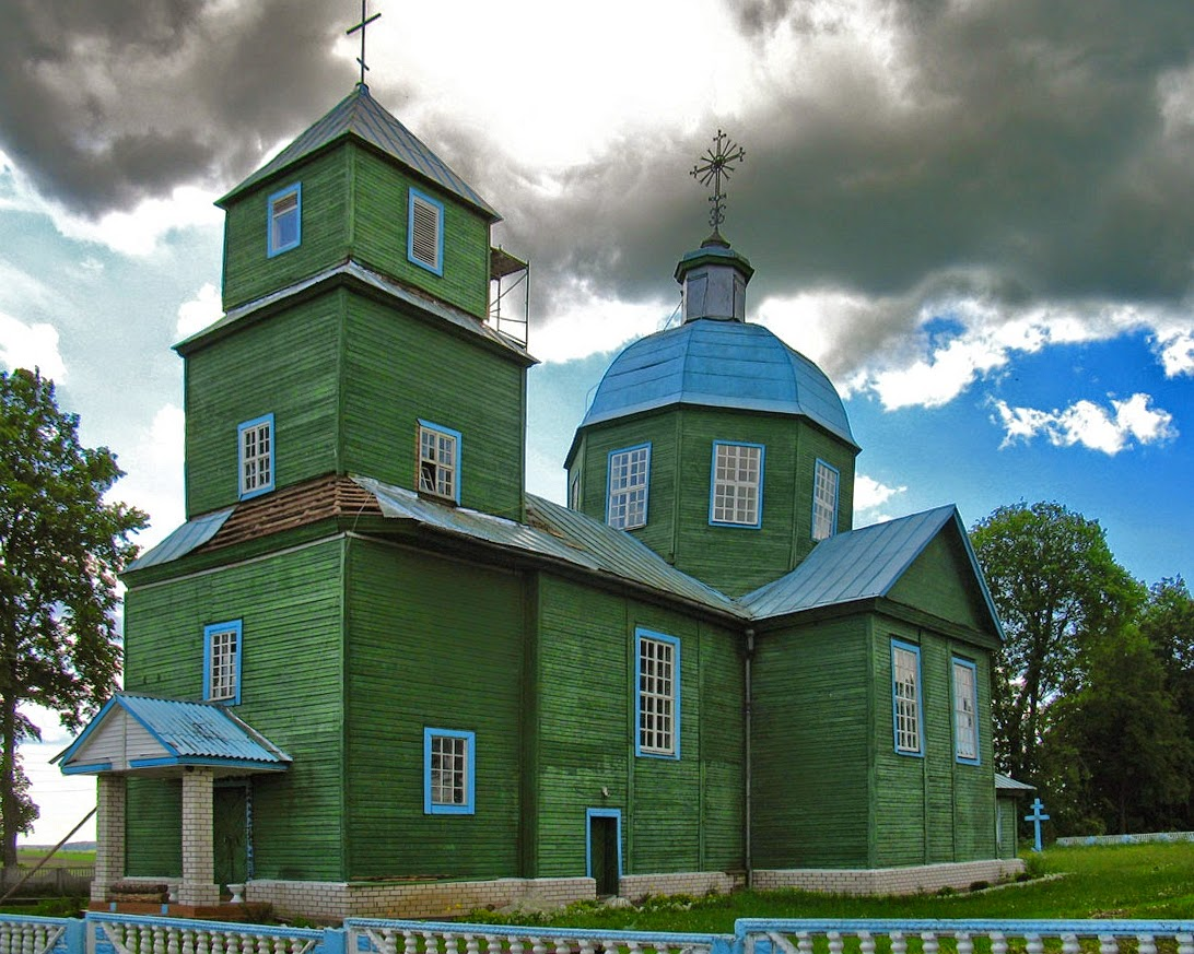 Беларуская (тарашкевіца): Порплішча